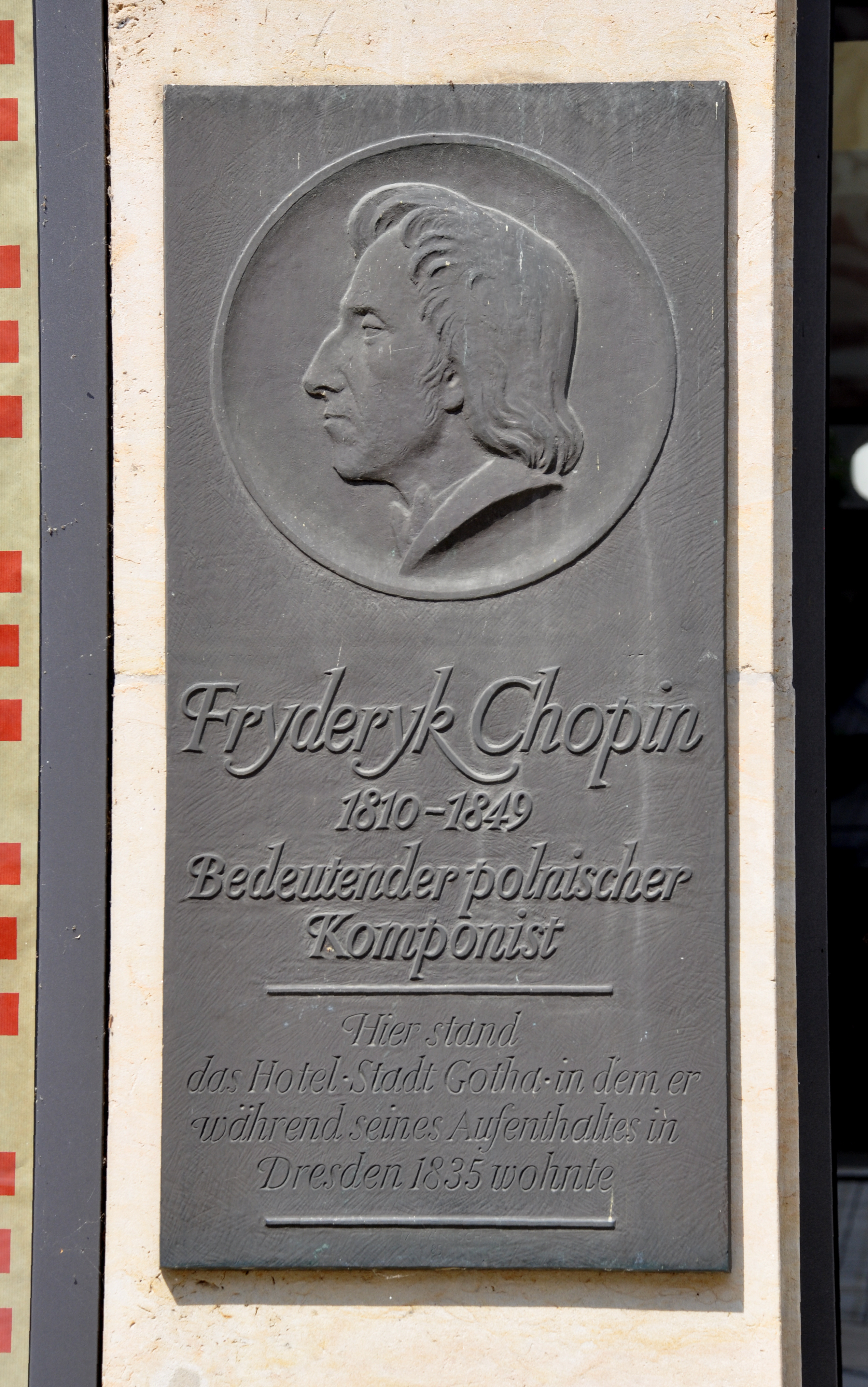 Dresden, Schloßstraße 5, Gedenktafel Frédéric (Fryderyk) Chopin